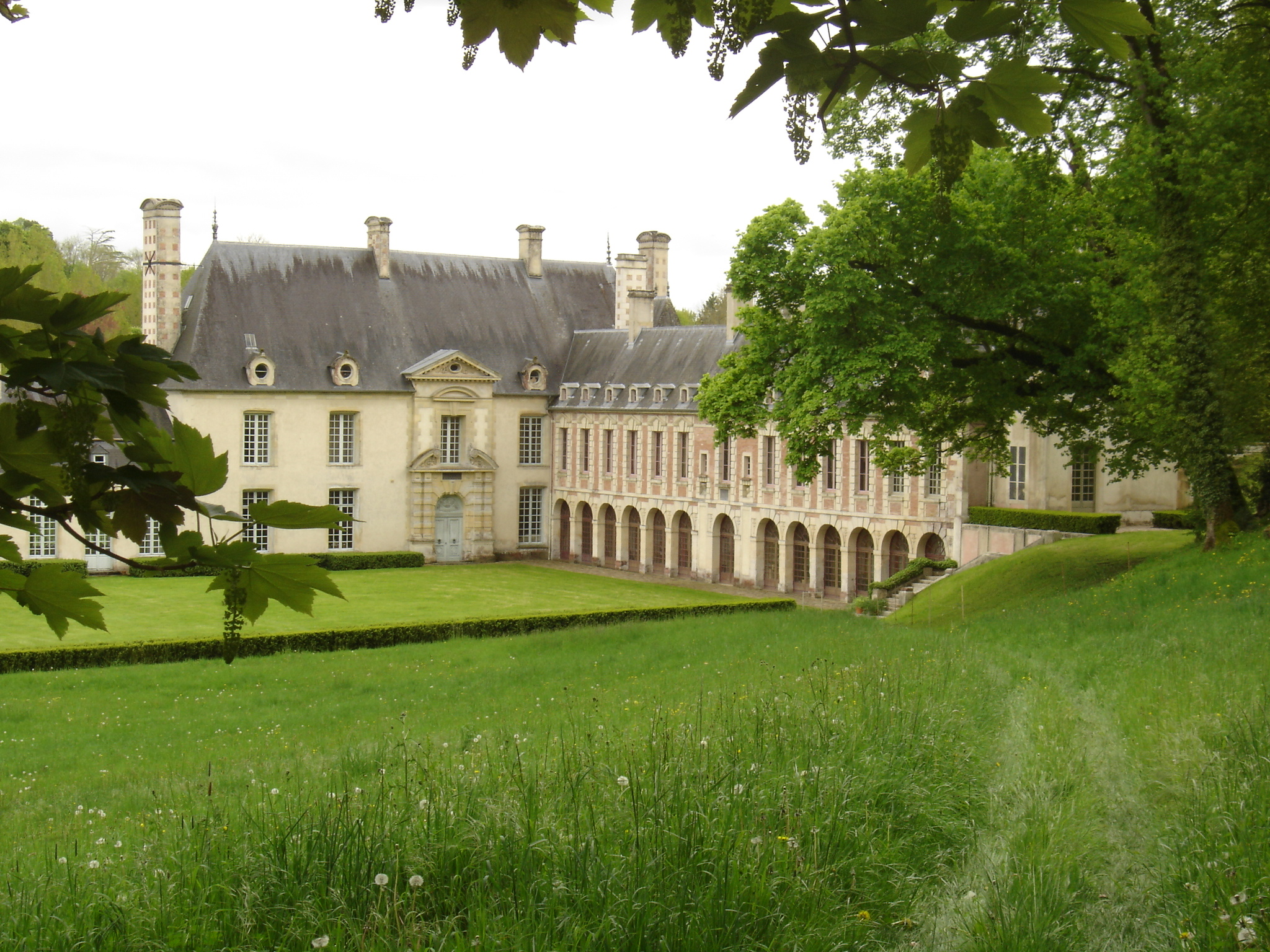 château, logis et aile sud